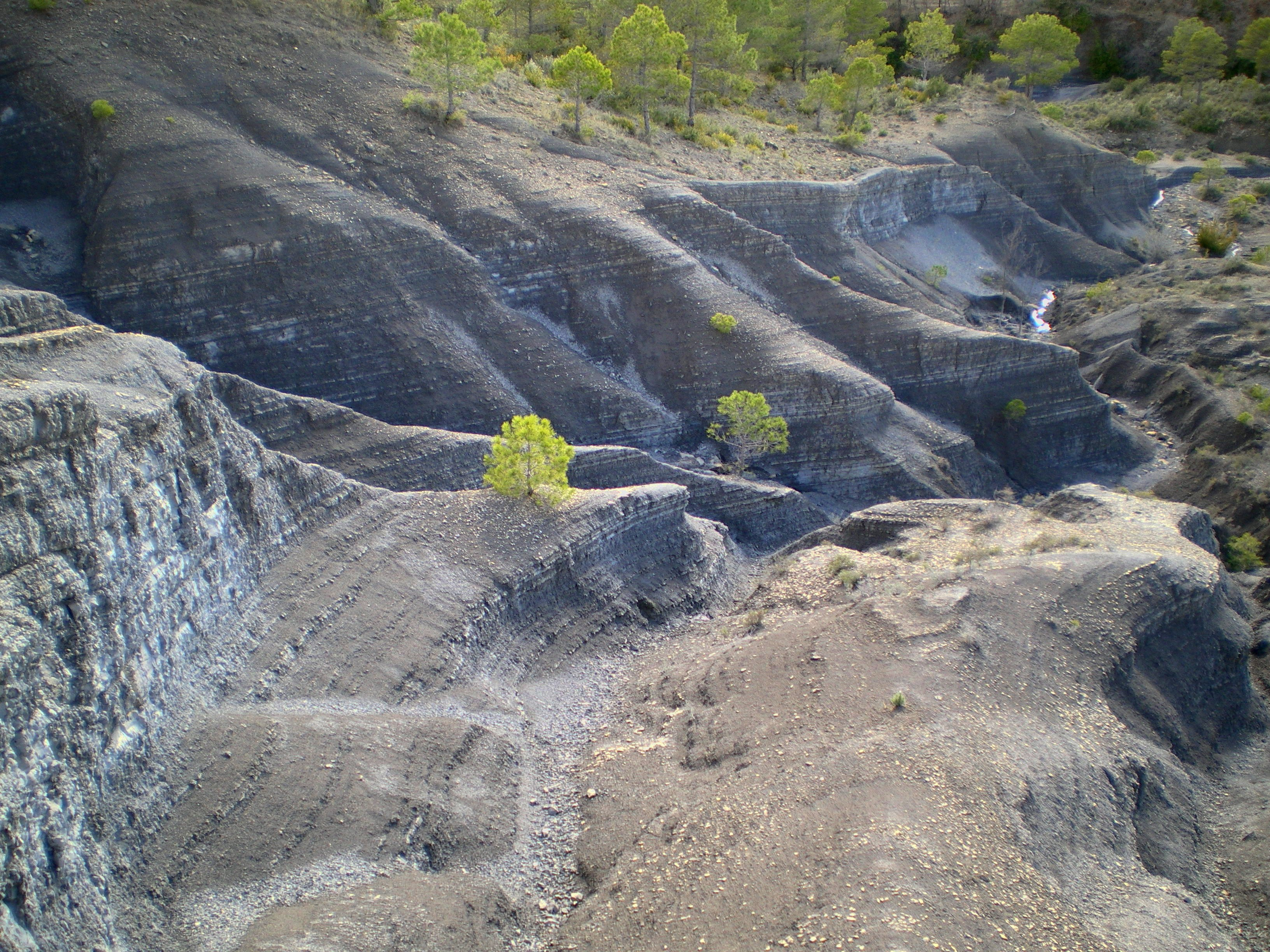 Terreros